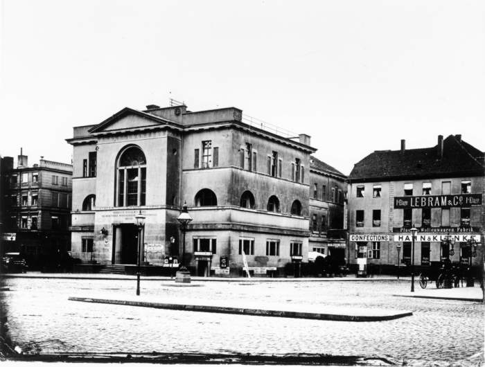 Alte Münze am Werderschen Markt in Berlin, 1885.